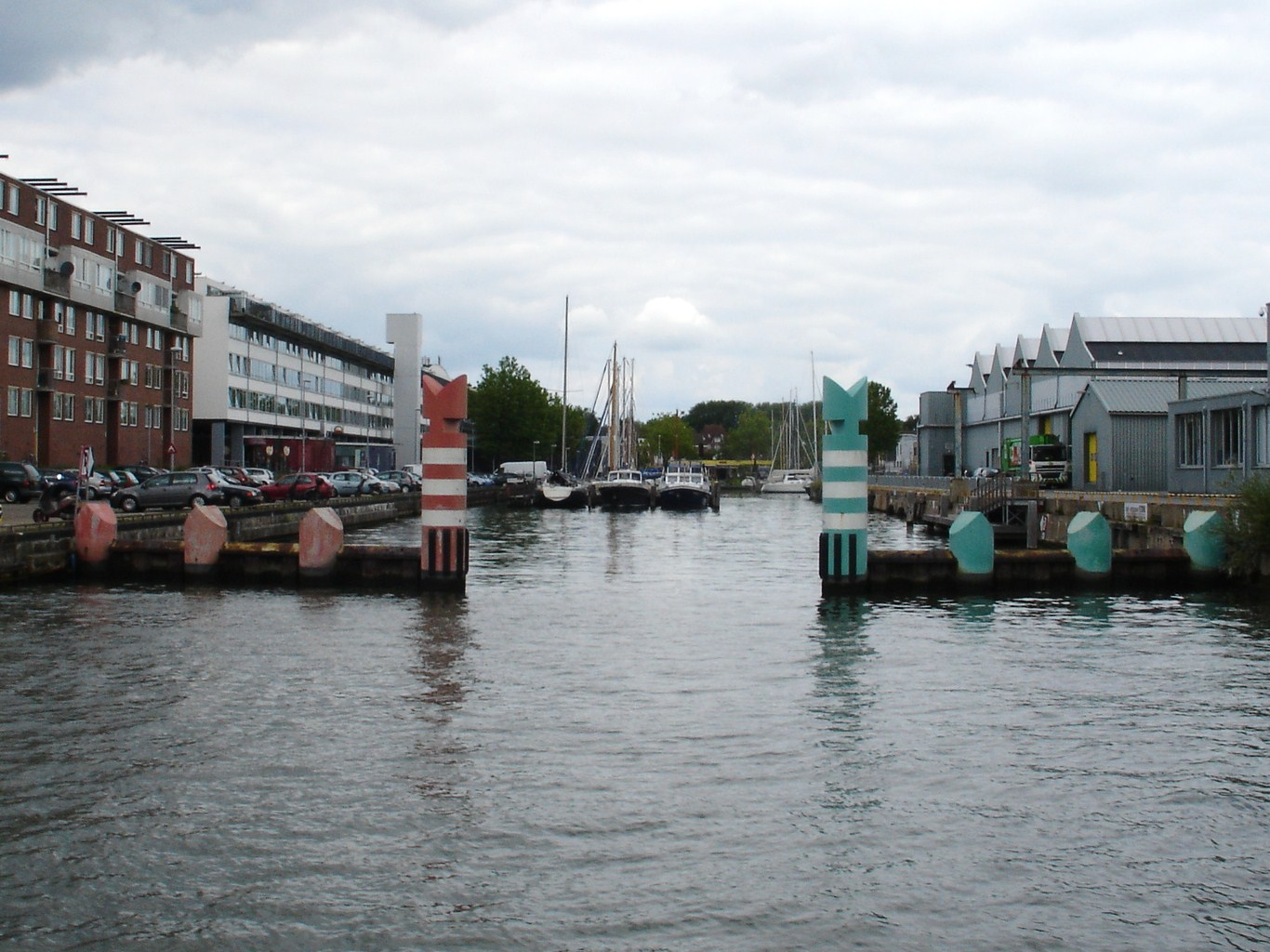 Golfbreker jachthaven Aeolus. Motorkanaal, Amsterdam-Noord 1995. Dirk Sterenberg